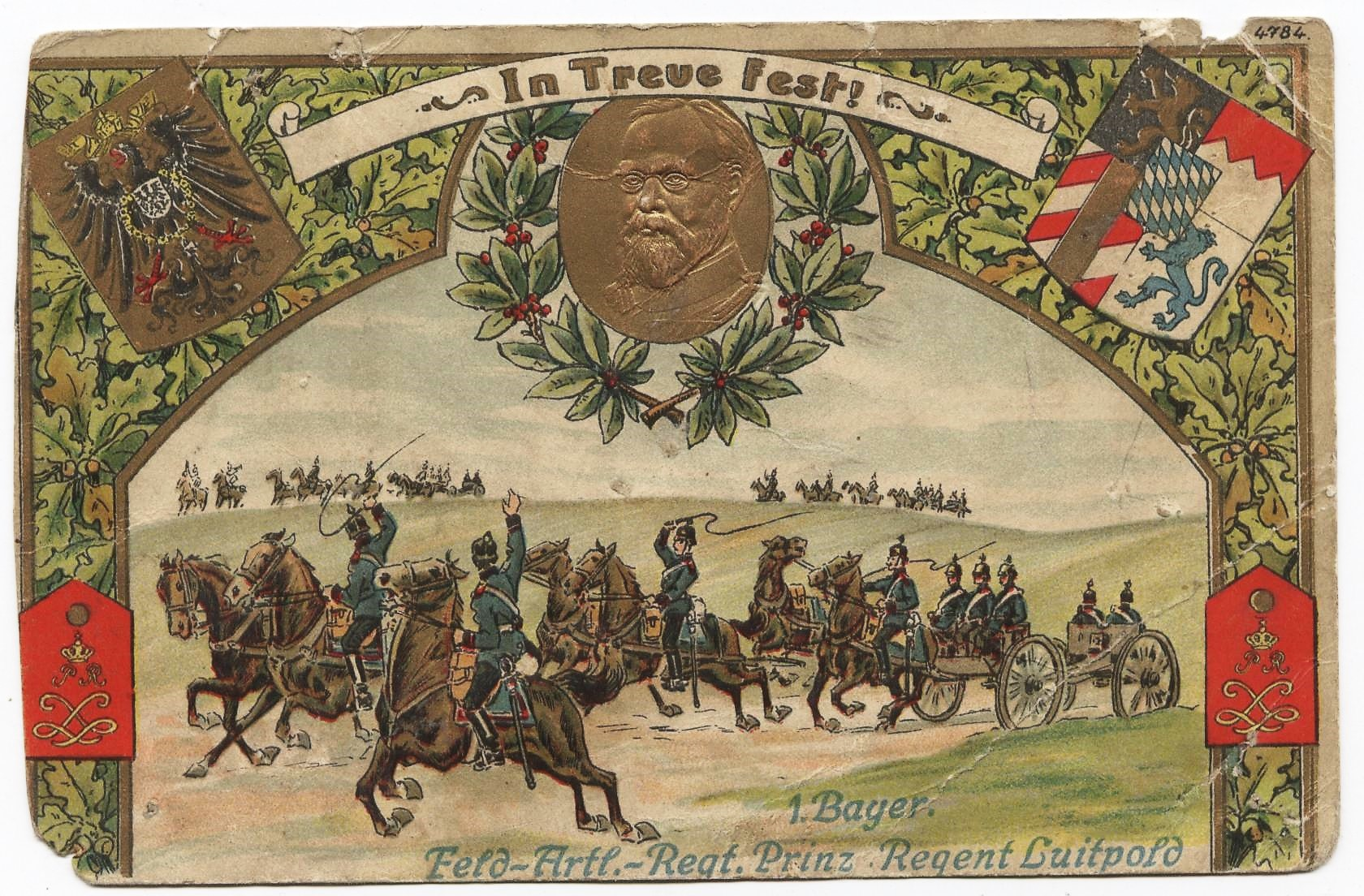 1. Bayerisches Artillerie Regiment Prinzregent Luitpold